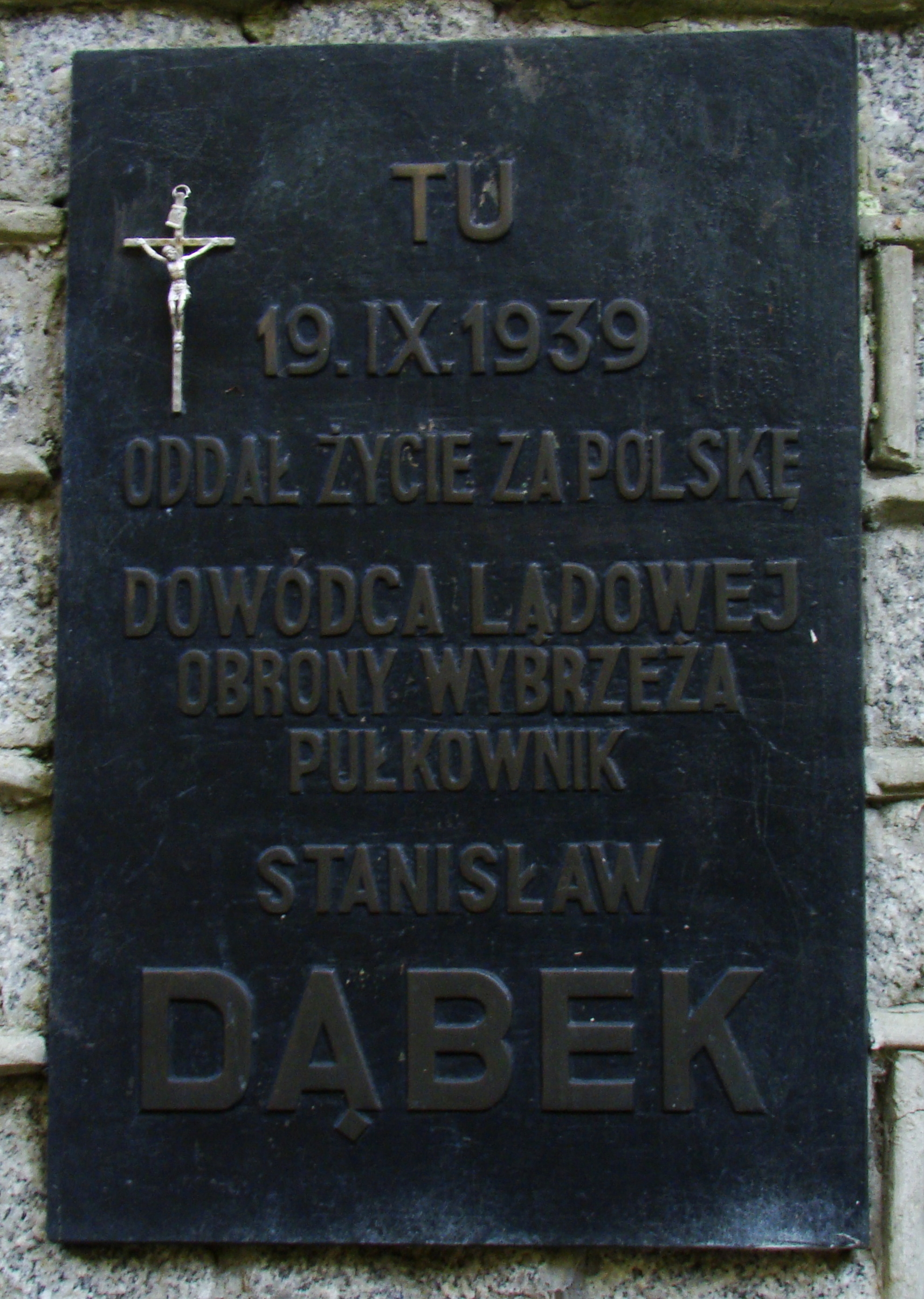 Tablica umieszczona na pomniku, który znajduje się na terenie 43.Bazy Lotnictwa Morskiego w Gdyni-Babich Dołach.